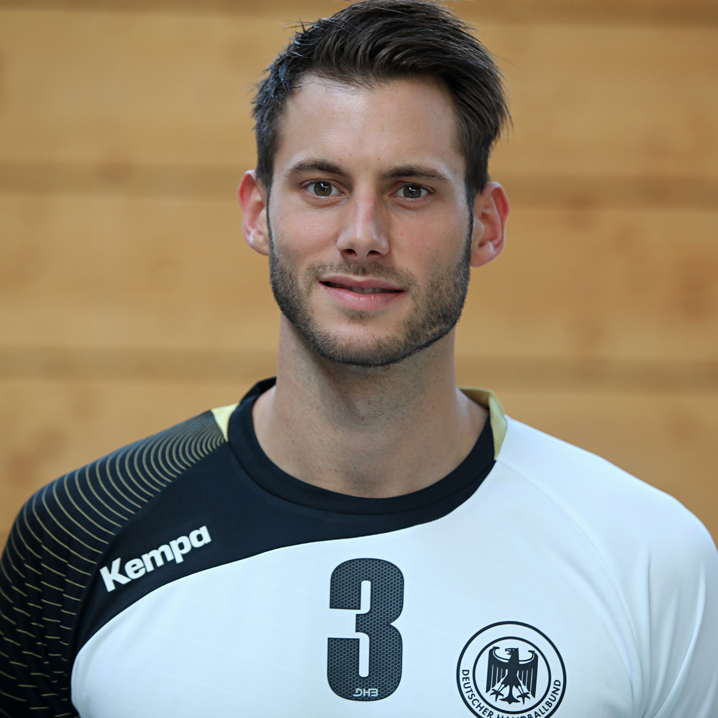 Uwe Gensheimer, im Trikot der Deutschen Handball-Nationalmannschaft am 16. September 2014, in Heilbronn.